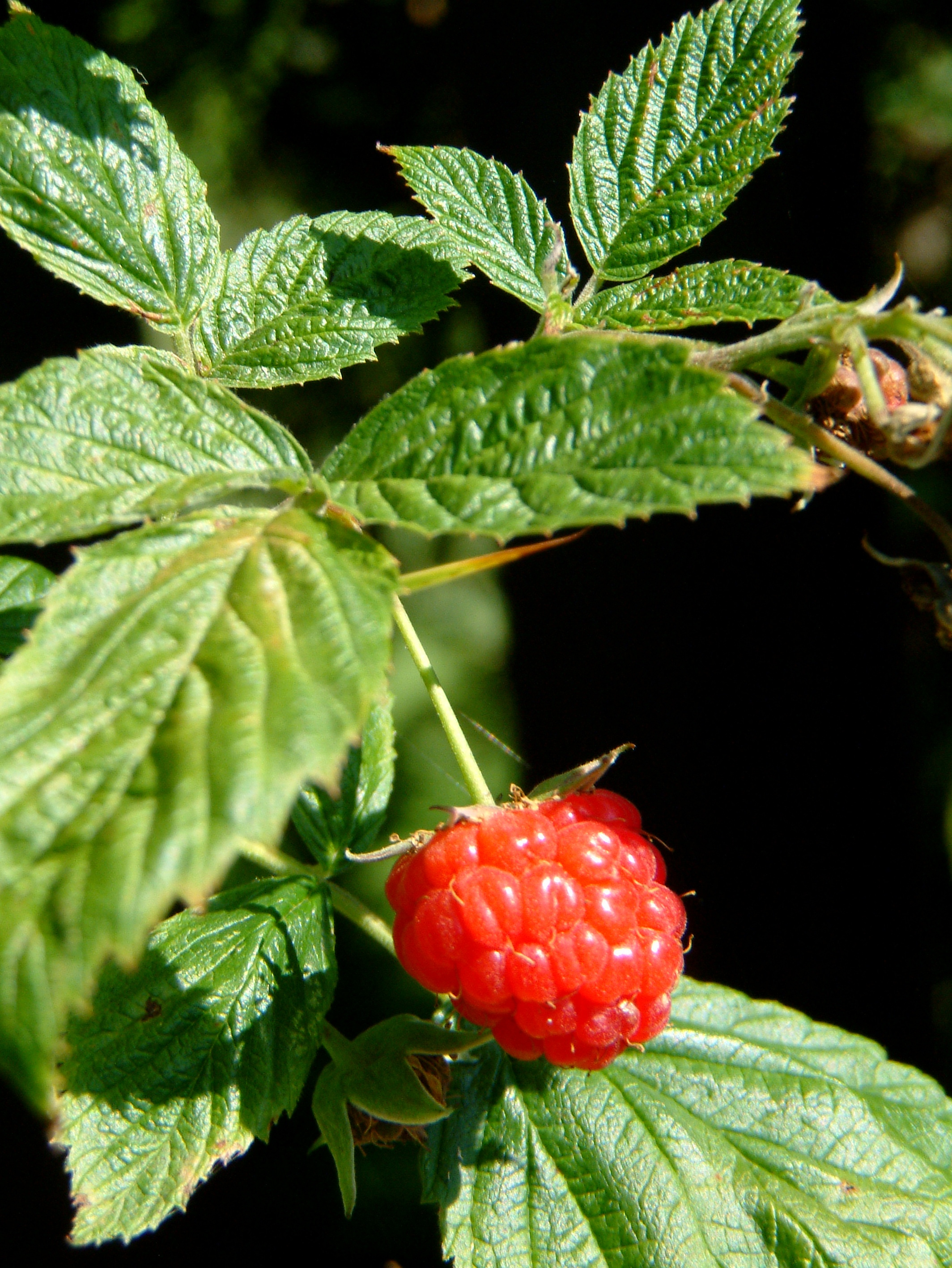 Rubus_idaeus_-raspberry_-_Himbeere